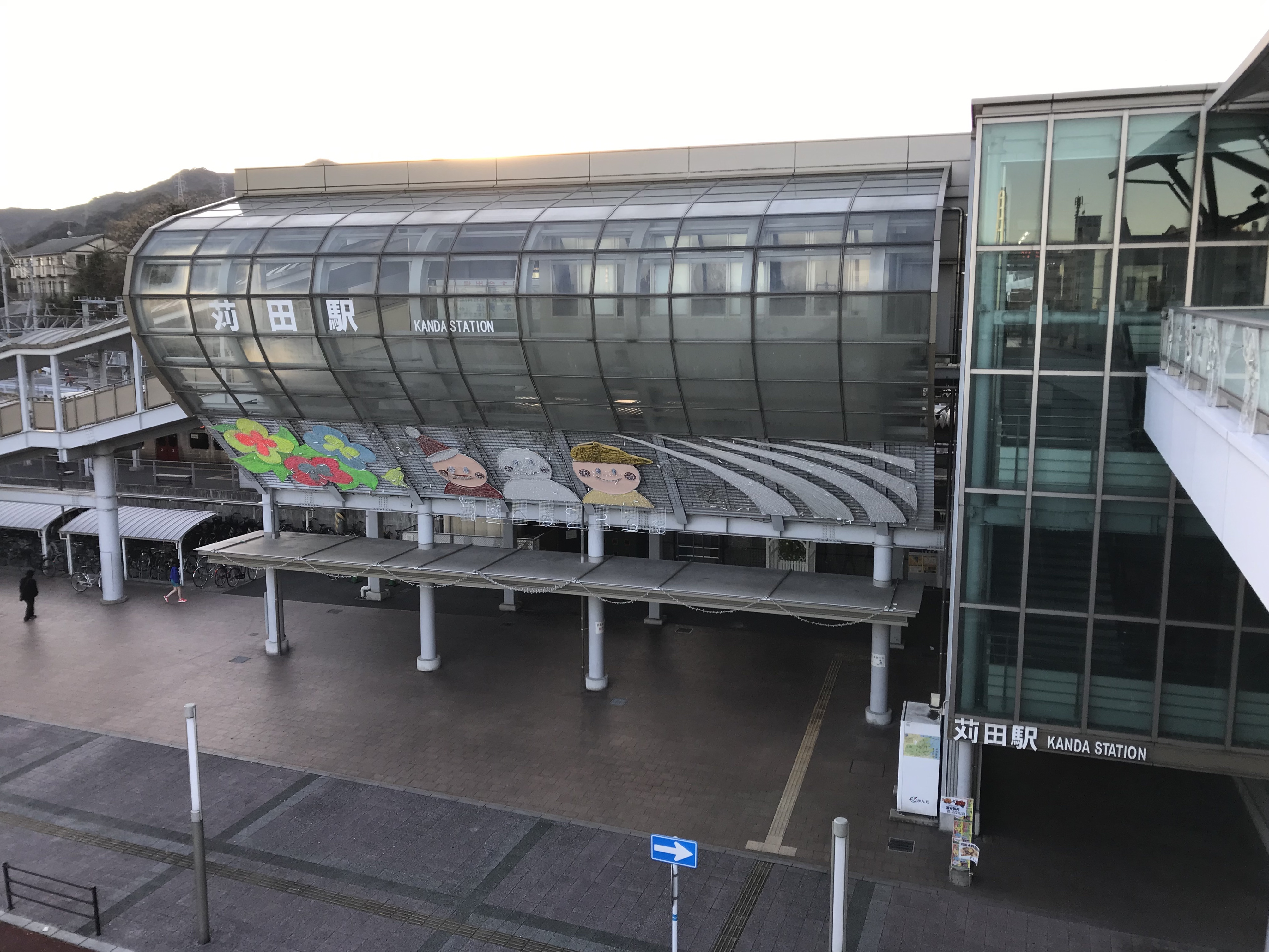 苅田駅の東口駅舎